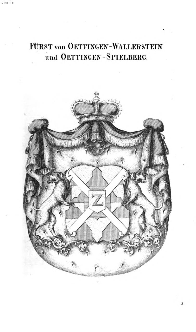 Wappen Oettingen Wallerstein Oettingen Spielberg - Tyroff AT.jpg